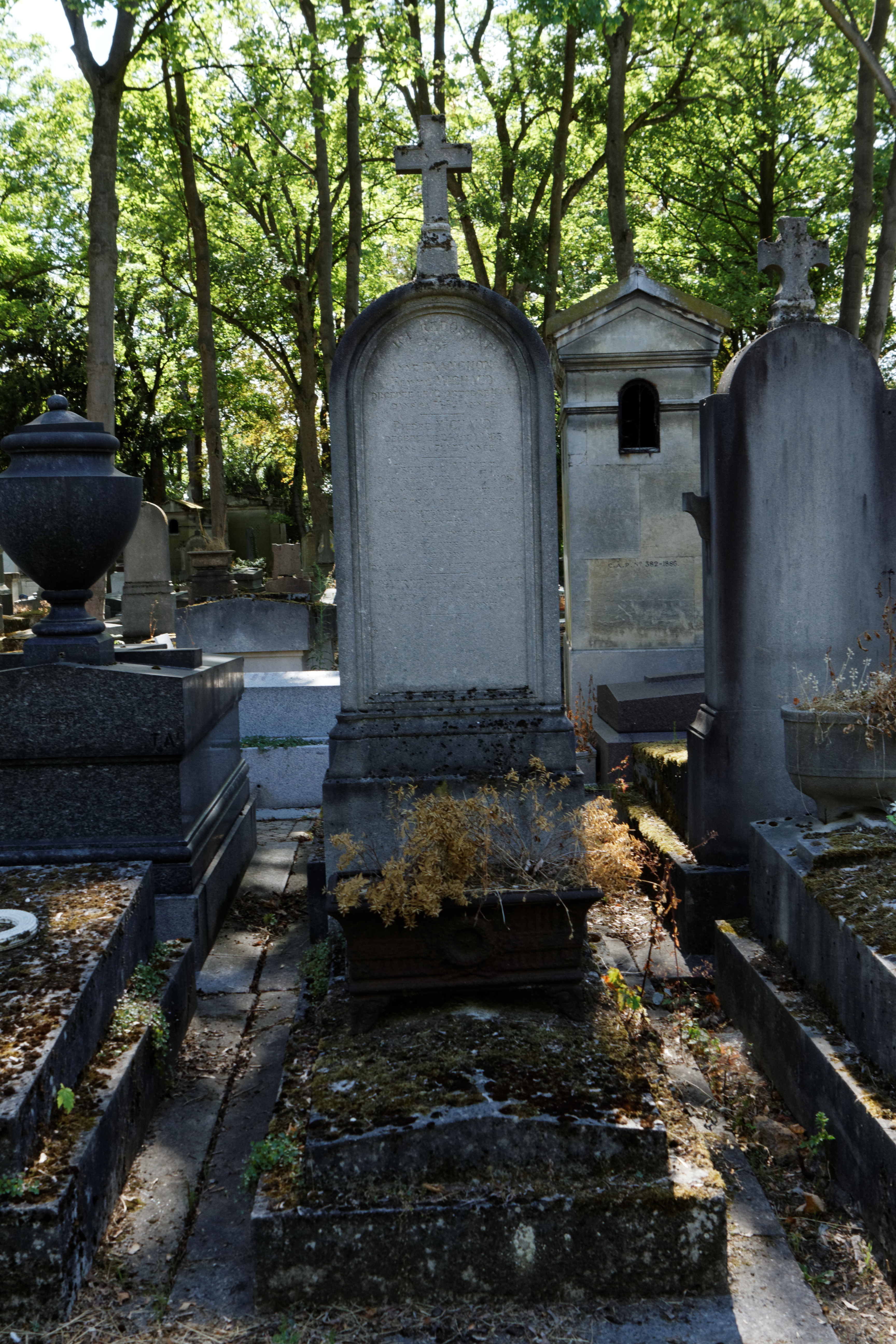 Sépulture de Frédéric Viret (1822-1898), maître de chapelle à l'église Saint-Germain-l'Auxerrois et compositeur de musique.